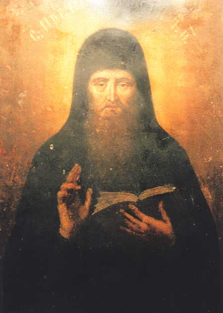 Saint Paisius, monk of Kyiv Caves Monastery, Ukraine (14th century). Orthodox saint. Паїсій, інок Печерський - XIV ст. Чернець Печерського монастиря. Преподобний. Пам'ять 10 вересня і 18 липня. Товариш і однодумець прп.Меркурія пісника. Жив з ним в одній келії і був похований поруч з ним. Його мощі спочивають у Дальніх печерах.